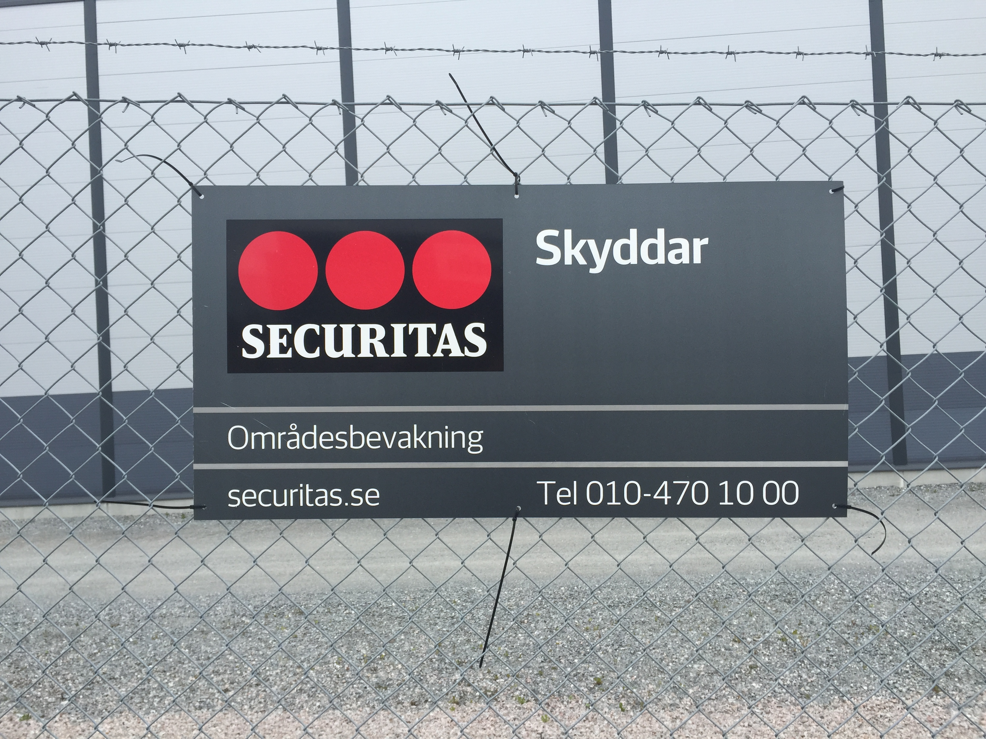 Skylt Securitas Skyddar